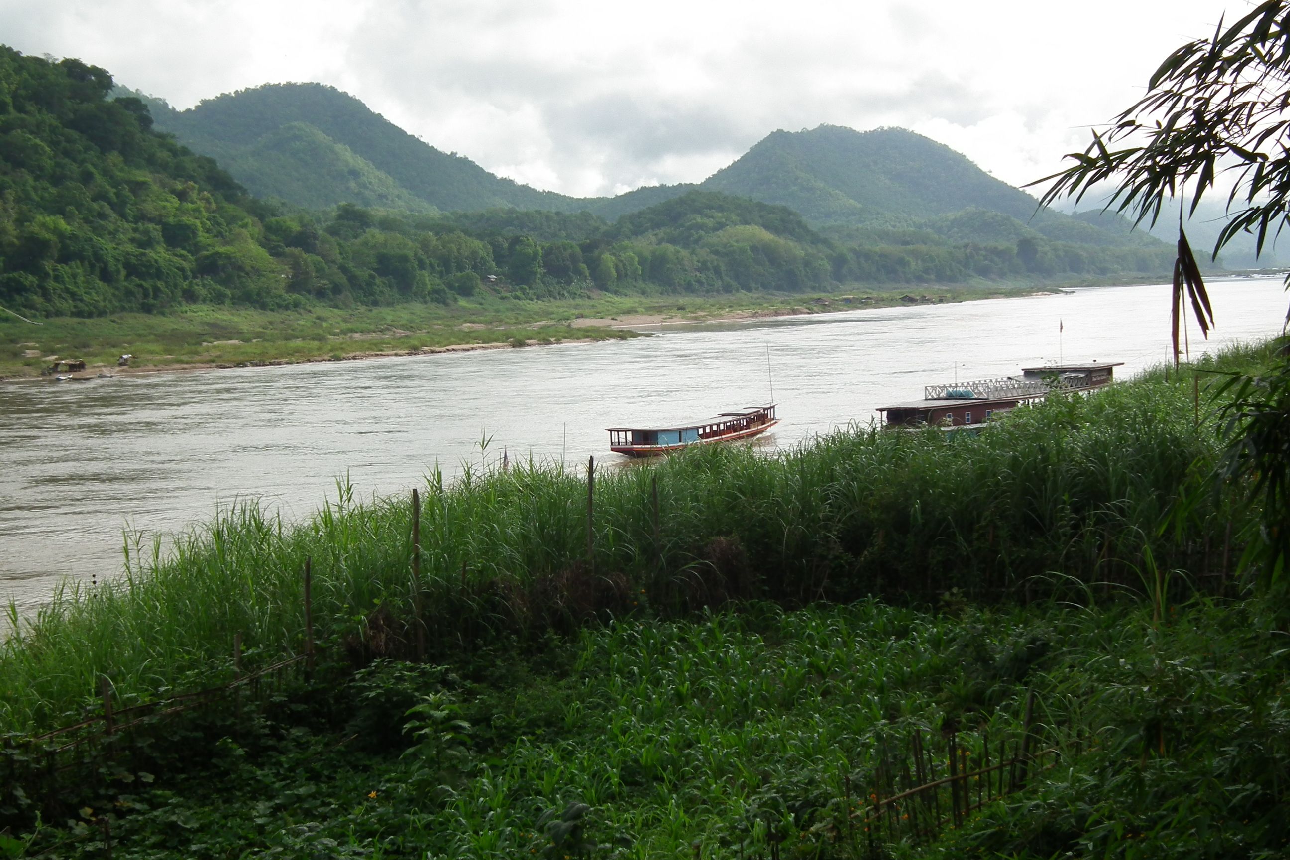 メコン川 Mekong River Luang Phabang-Laos แม่น้ำโขง